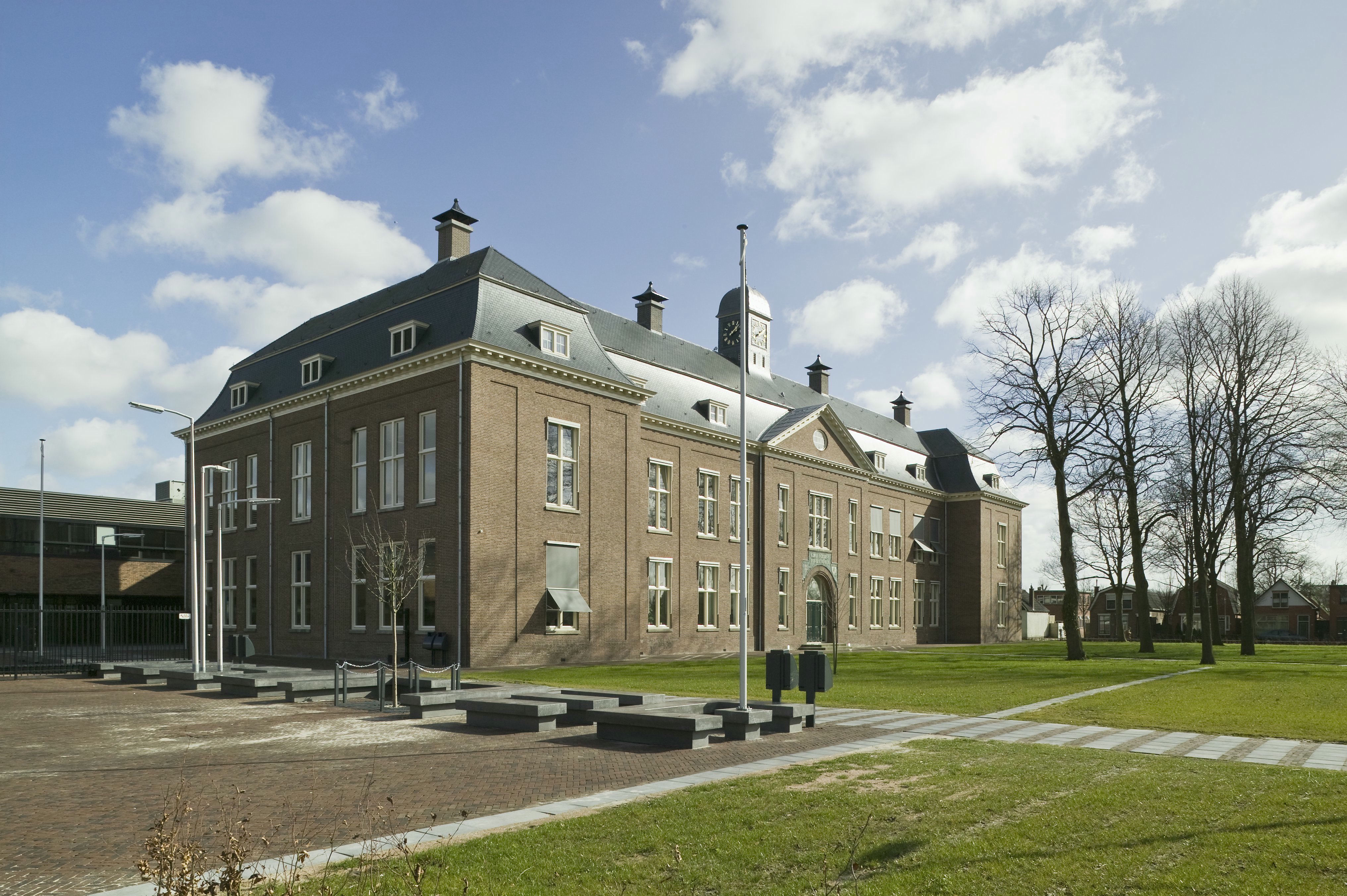 Rijks Hogere Burger School, thans Drachtster Lyceum: Overzicht voorgevel en linker zijgevel van het oude gebouw